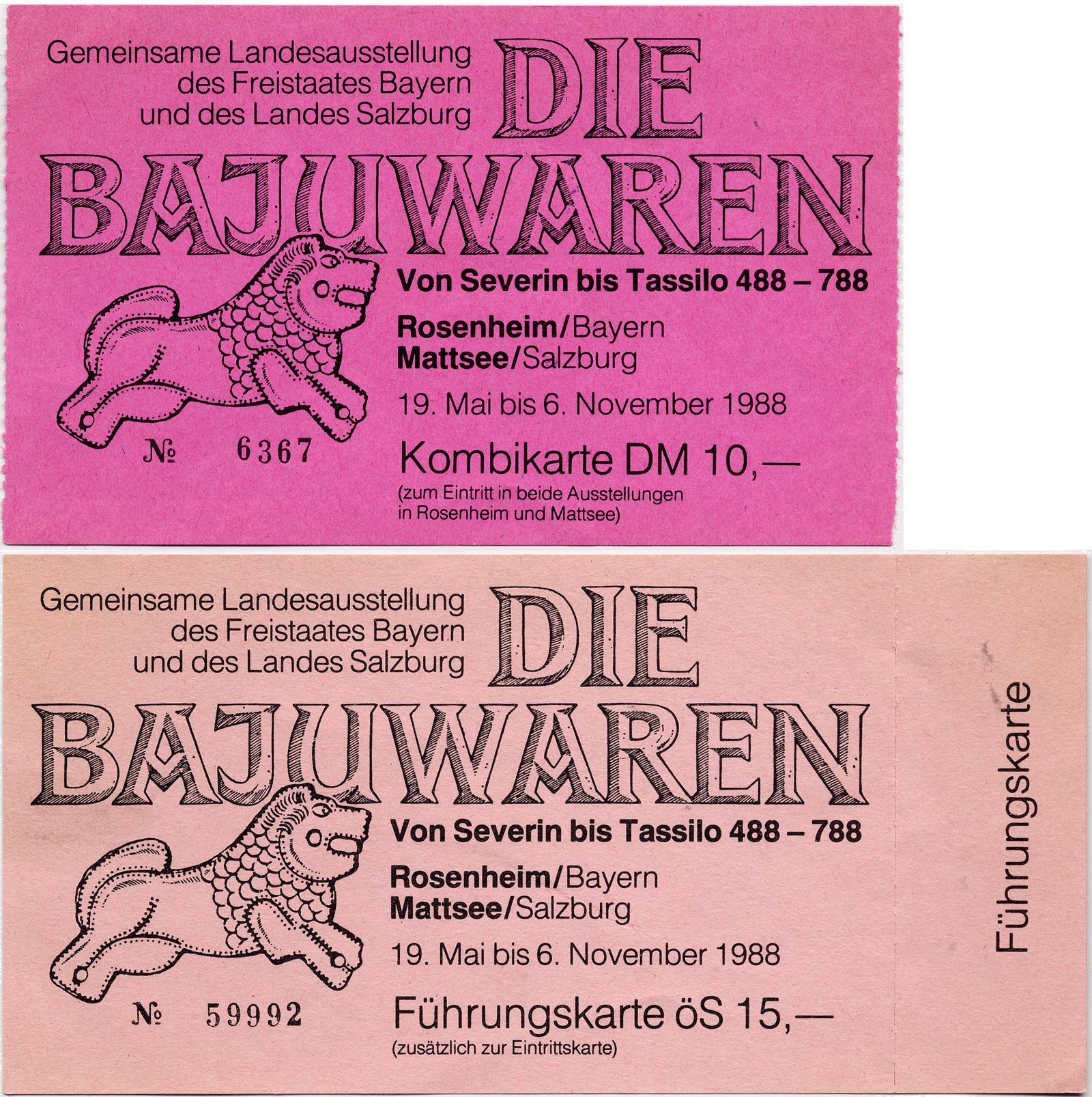 Kombi- und Führungskarte zur gemeinsamen Landesausstellung "Die Bajuwaren" des Freistaates Bayern und des Landes Salzburg